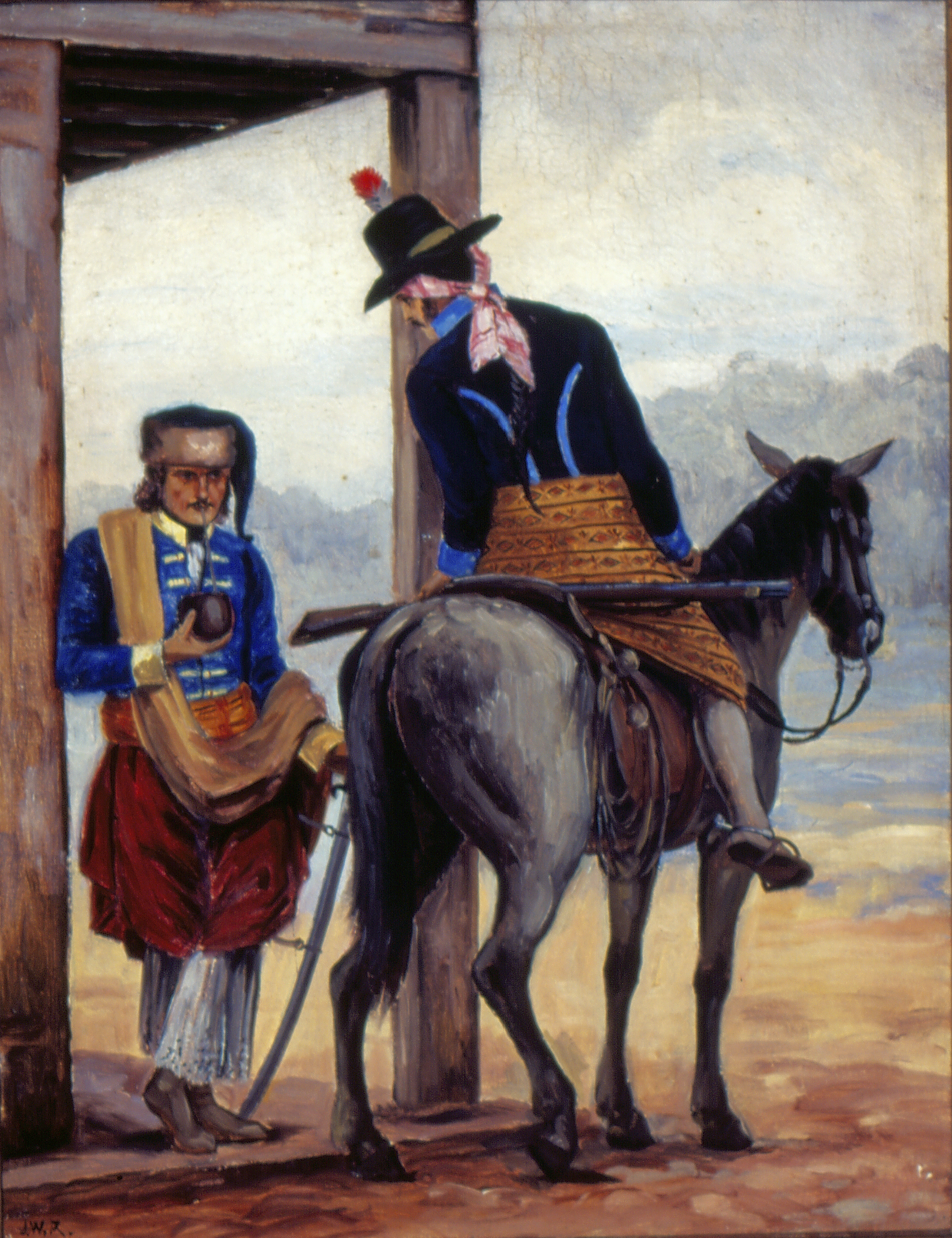 Obra que integra o acervo do Museu Paulista da USP. Coleção José Wasth Rodrigues - CJWR